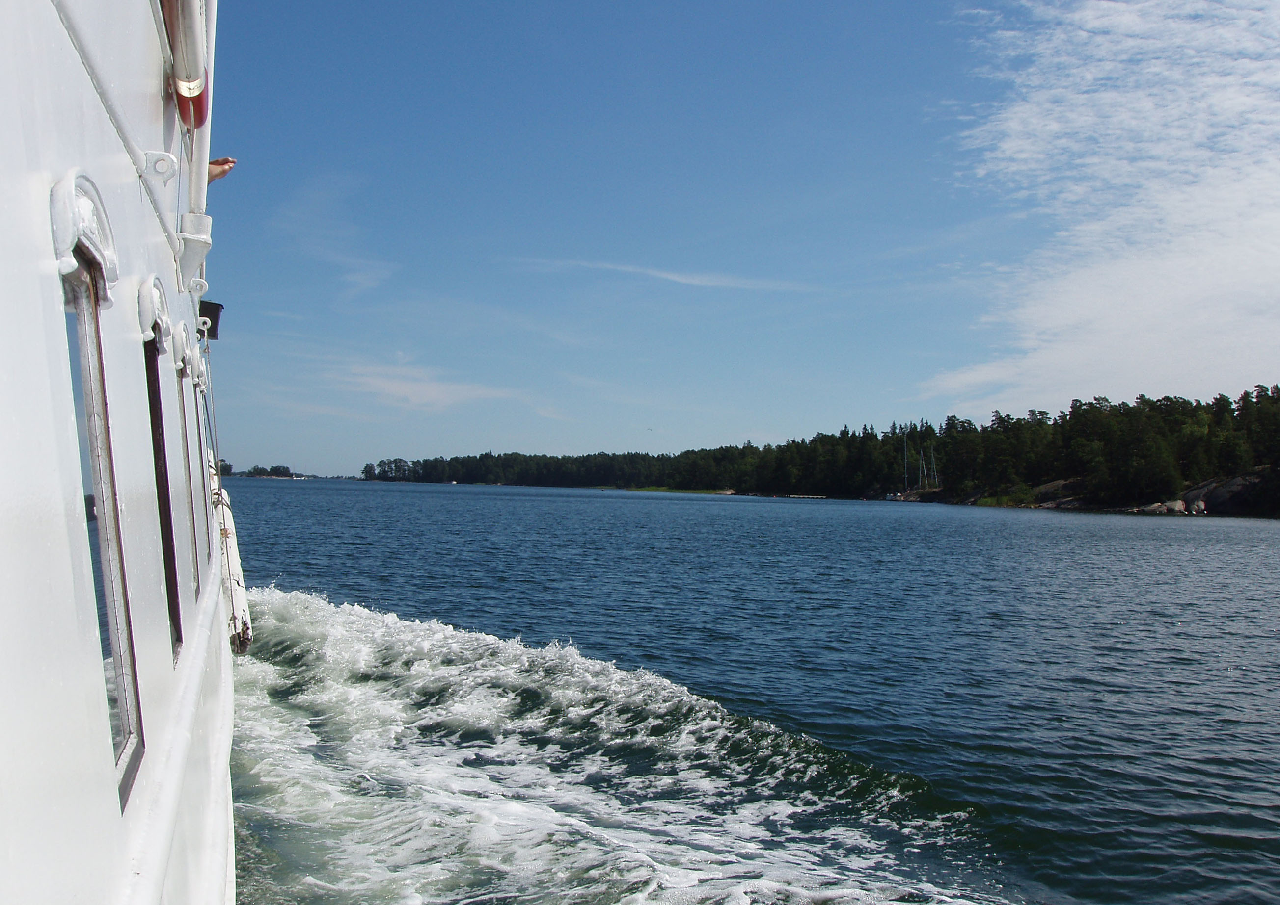 Den västra sidan av Östra Lagnö på Ljusterö med vy norrut i riktning mot Husaröleden, Stockholms skärgård.